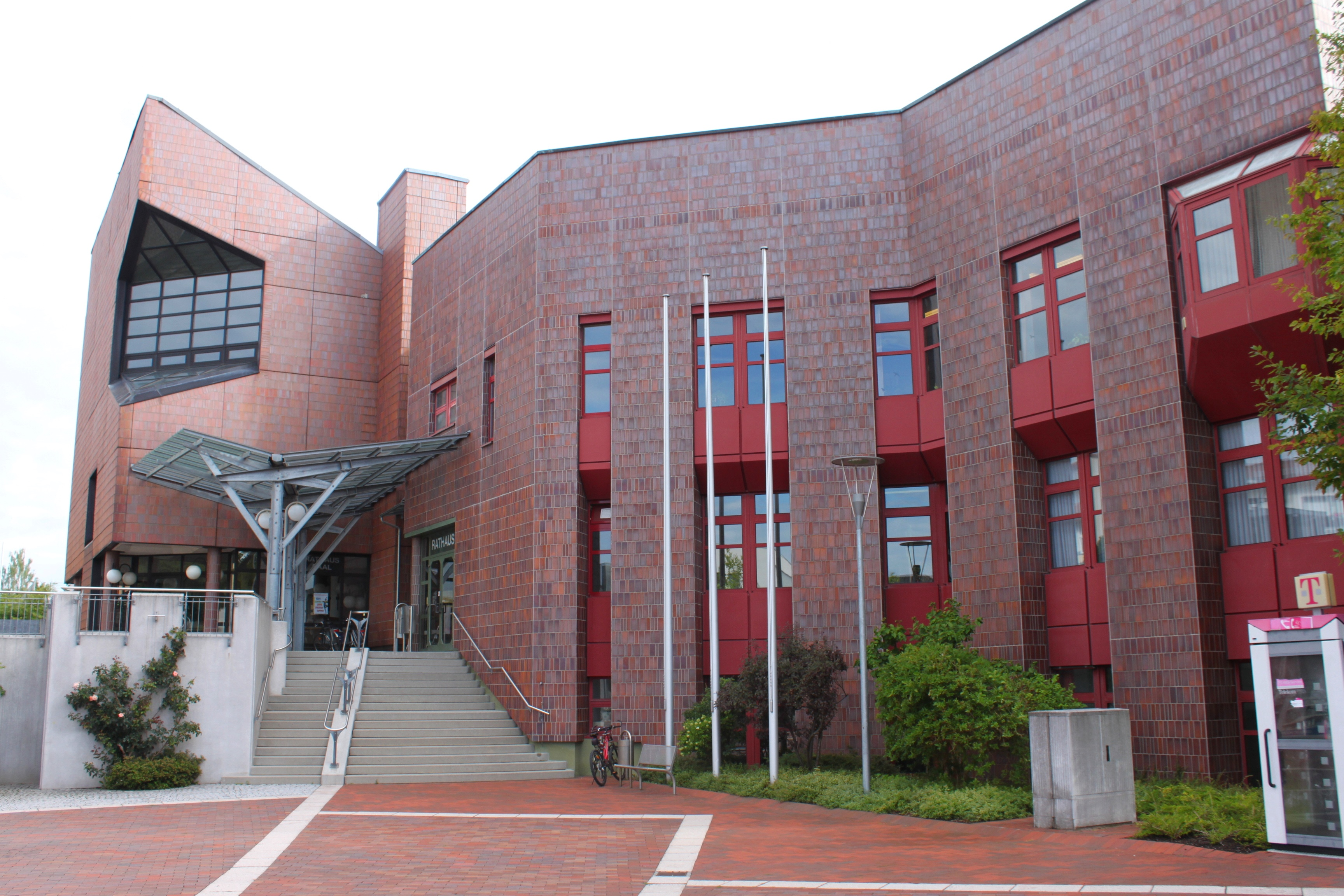 Das Rathaus von Rödental.